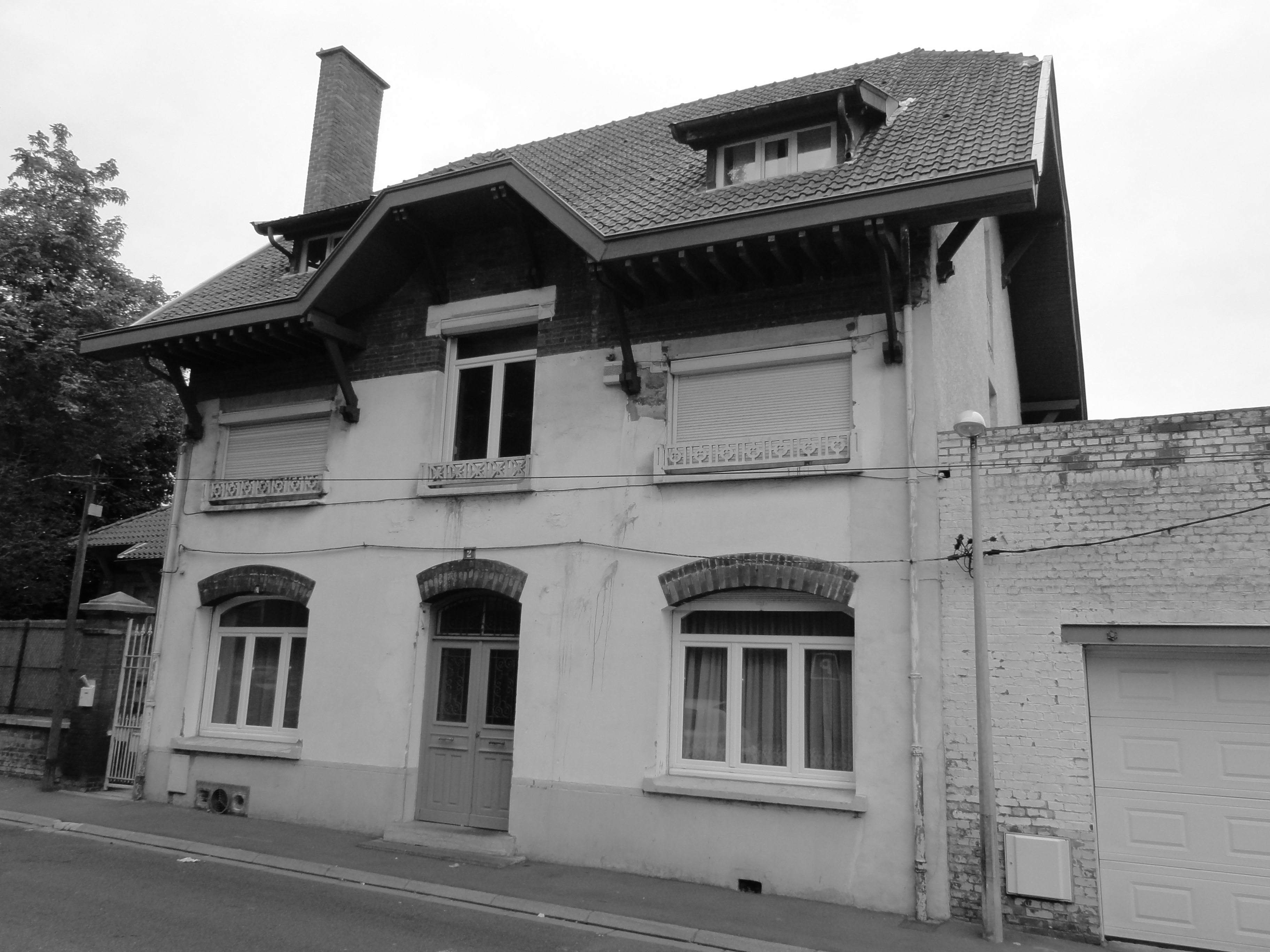 Logement des Sœurs des cités de la Fosse n° 12 de la Compagnie des mines de Lens, Lens, Pas-de-Calais, Nord-Pas-de-Calais, France. .